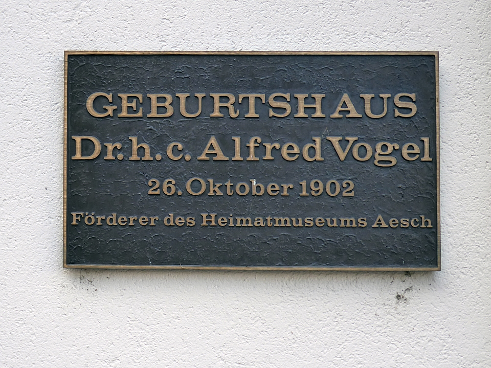 Inschrift an dem Geburtshaus von Alfred Vogel in Aesch, Basel-Land. Schweizer Heilpraktiker, Pionier, Unternehmer